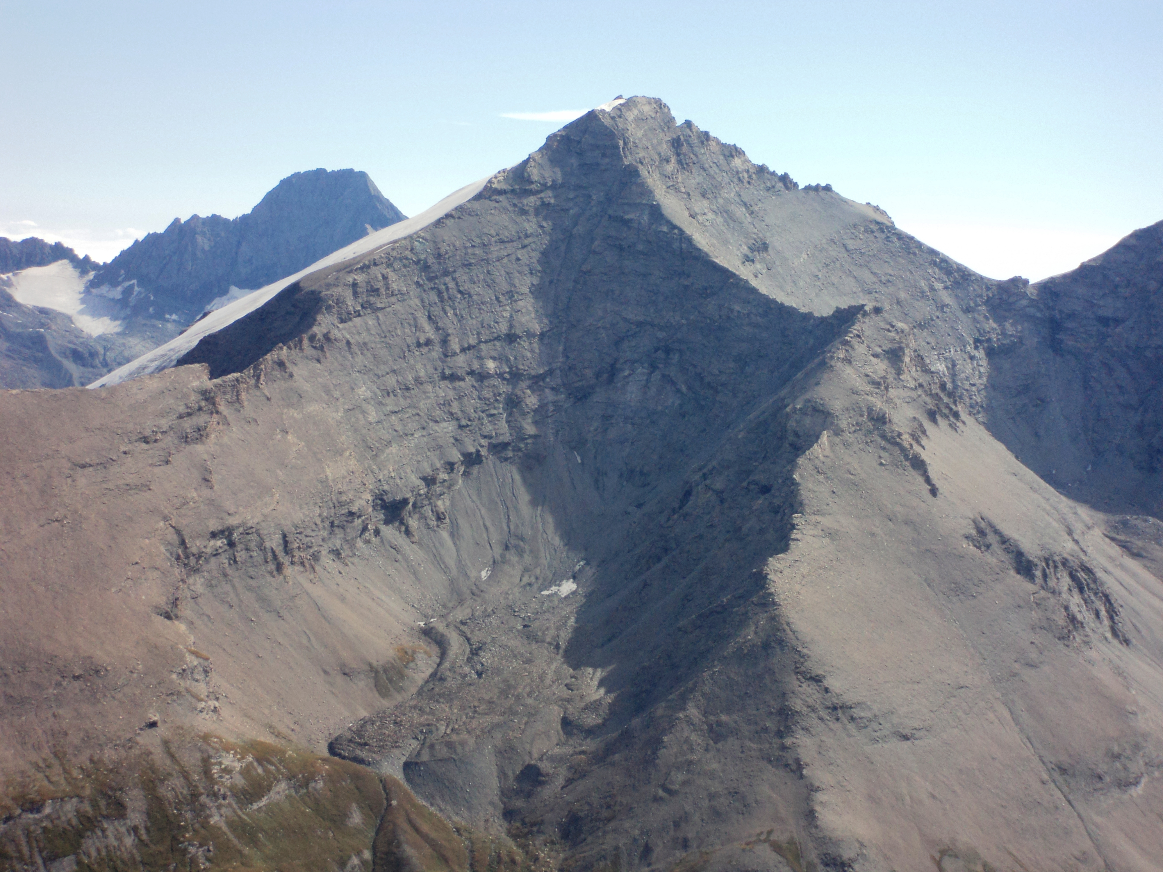 Versante ovest della Pointe de Charbonnel vista dalla Pointe de Ronce.